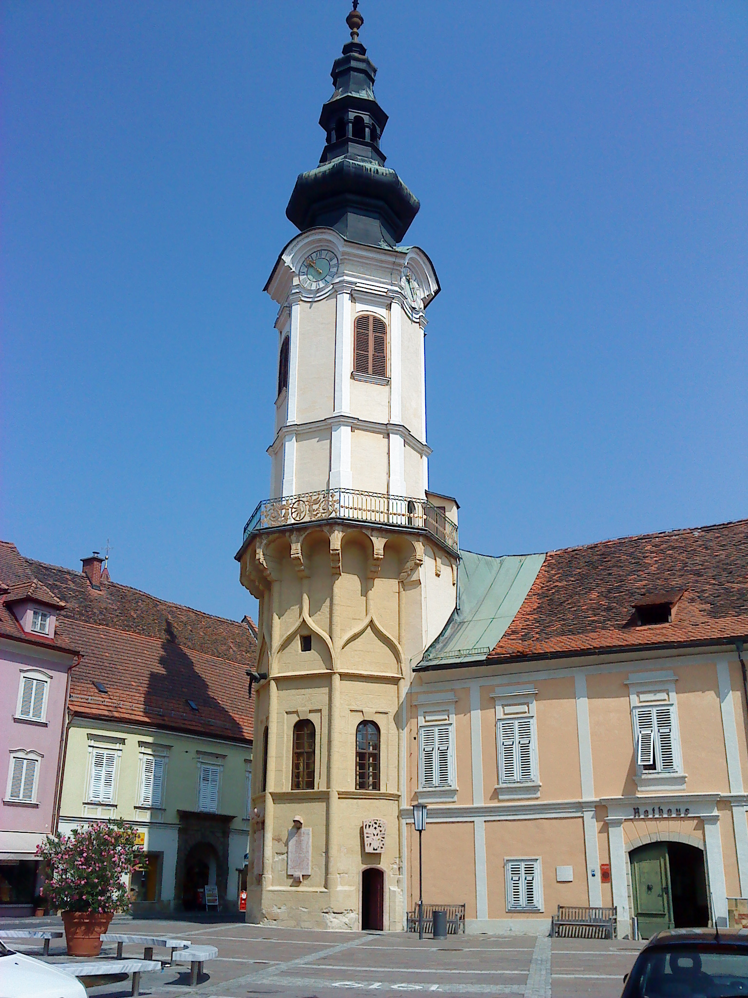 Der Rathausturm von Bad Radkersburg